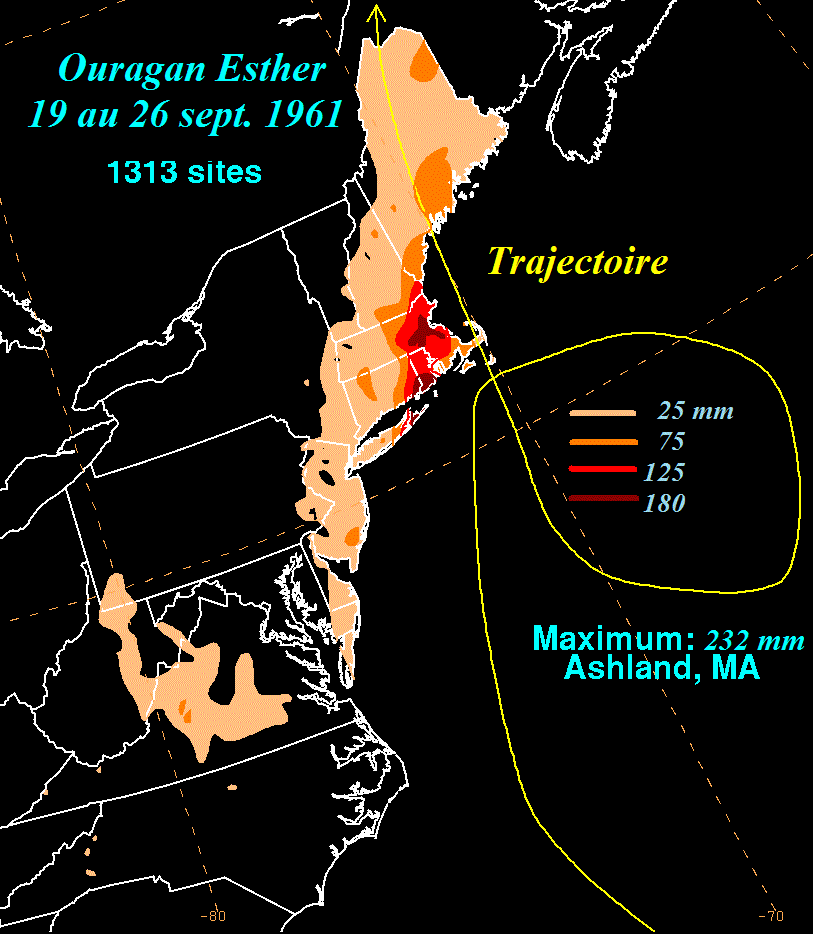 Accumulations de pluie avec l'ouragan Esther de 1961. Version française.